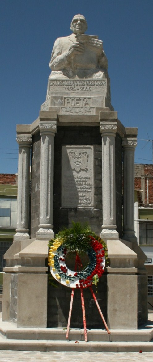 Monumento a Luis Alberto Costales en Riobamba, realizado por Eddie Crespo,Christian Gaibor Costales y Sr. Vargas